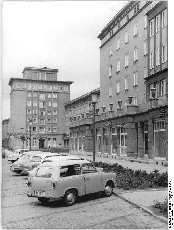 Rostock, Reutershagen, Wohnblocks Zentralbild Burmeister Sta-Kt 4.7.1962 Zur Vorbereitung der Ostseewoche Die alte und doch so junge See-, Werft- und Hafenstadt Rostock ist auch in diesem Jahr wieder Gastgeber zur Ostseewoche. Tausende Gäste aus den Ostseeländern, Norwegens und Islands werden sich von dem großen Aufbautempo im Norden der DDR überzeugen können. UBz: Neue Wohnbauten in Rostock-Reutershagen.